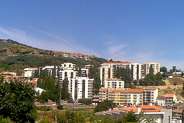 Lamego - Urb. do Paraíso